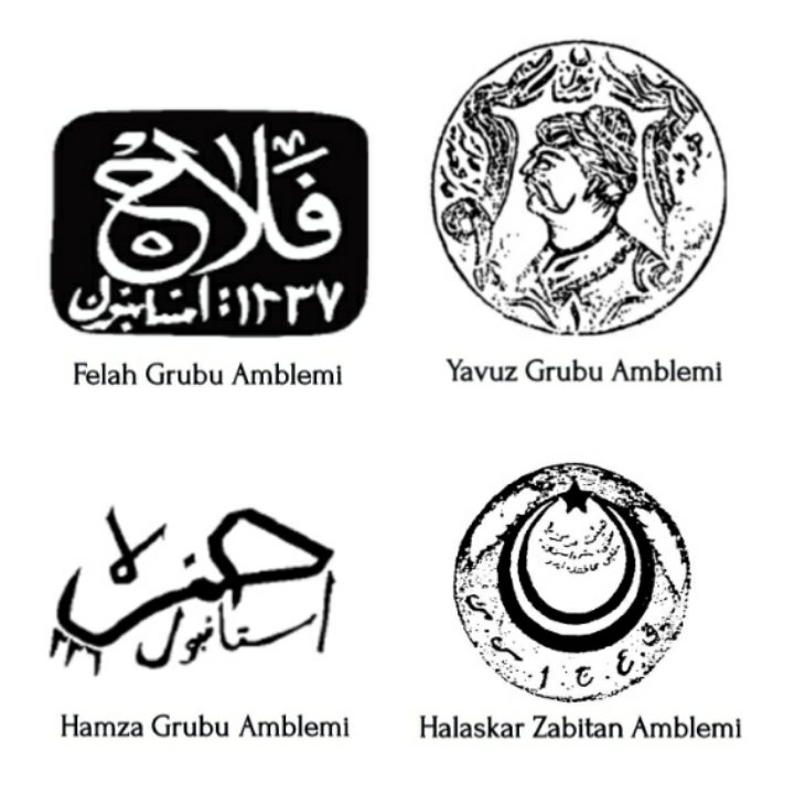 İstihbarat kurumları kullandıkları logolar